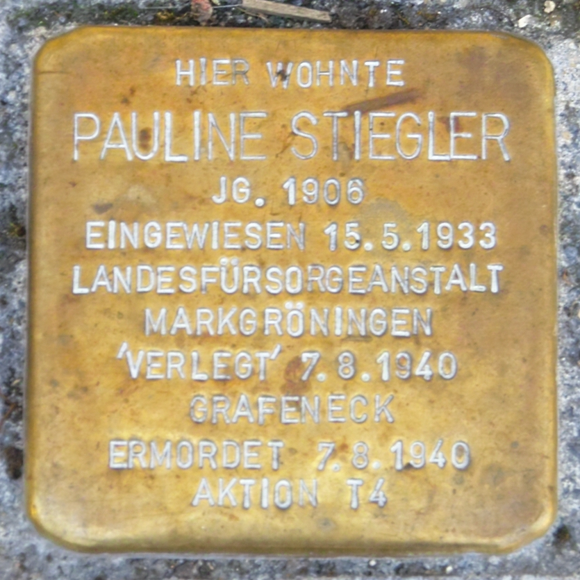 Stolperstein für Pauline Stiegler in D-71672 Marbach am Neckar, Niklastorstr. 12